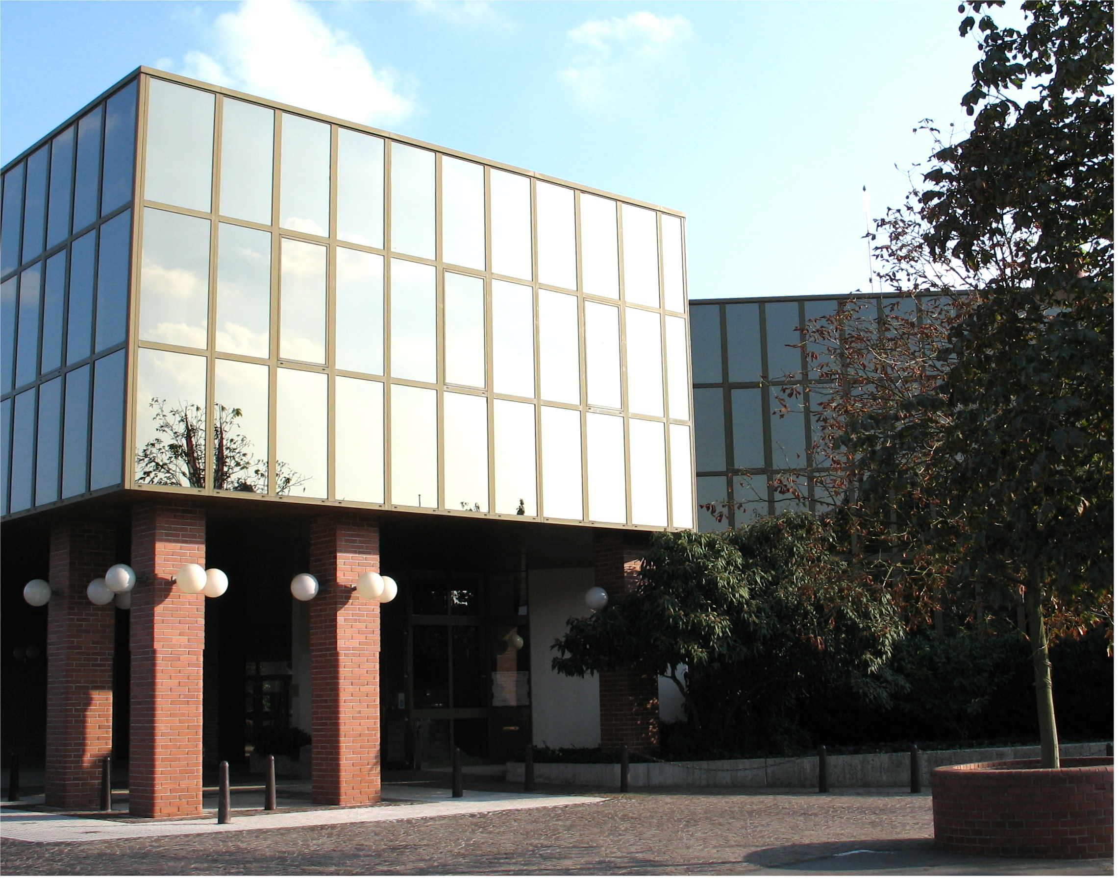 Sujet:D'Gemeng vu Walfer.